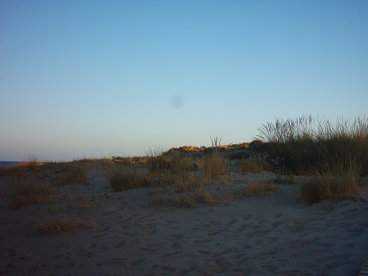 Dunas junto a la playa del Cargador. Alcalá de Chivert